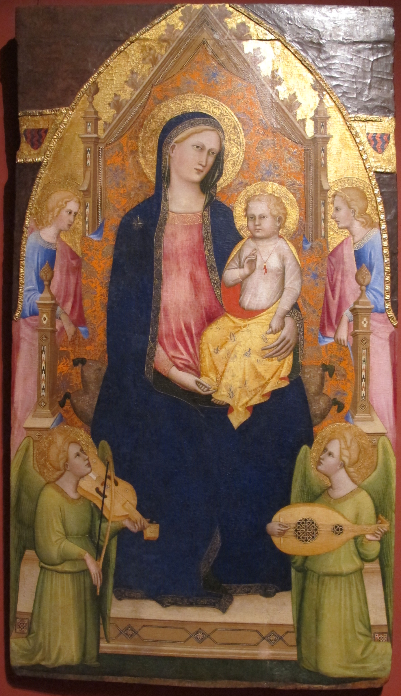 Giovanni di bartolomeo cristiani, maestà con angeli